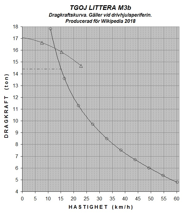 Teoretisk dragkraftskurva - TGOJ Littera M3b.